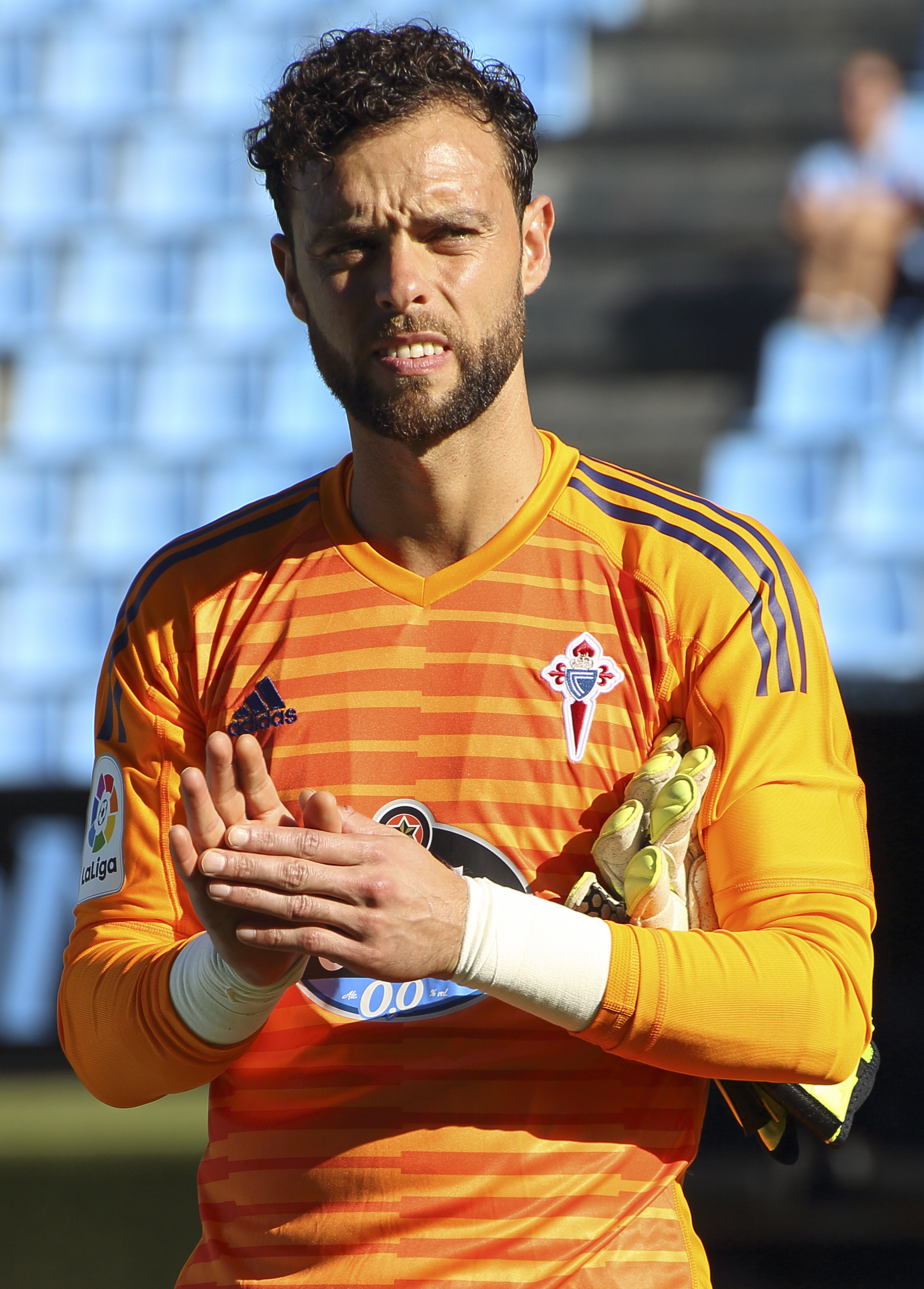 Presentación RC Celta - Temporada 18/19